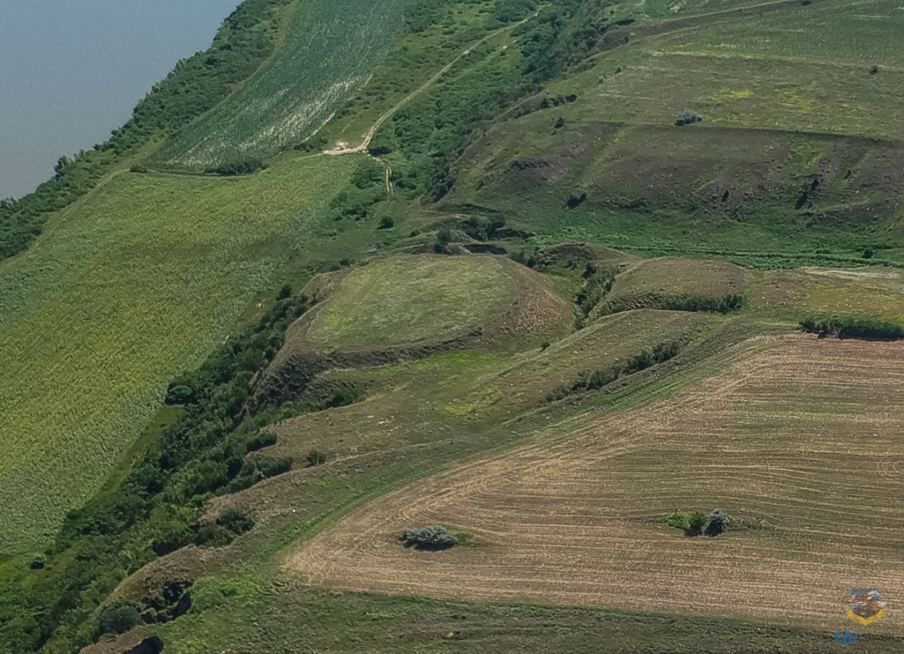 Cetate getică 03